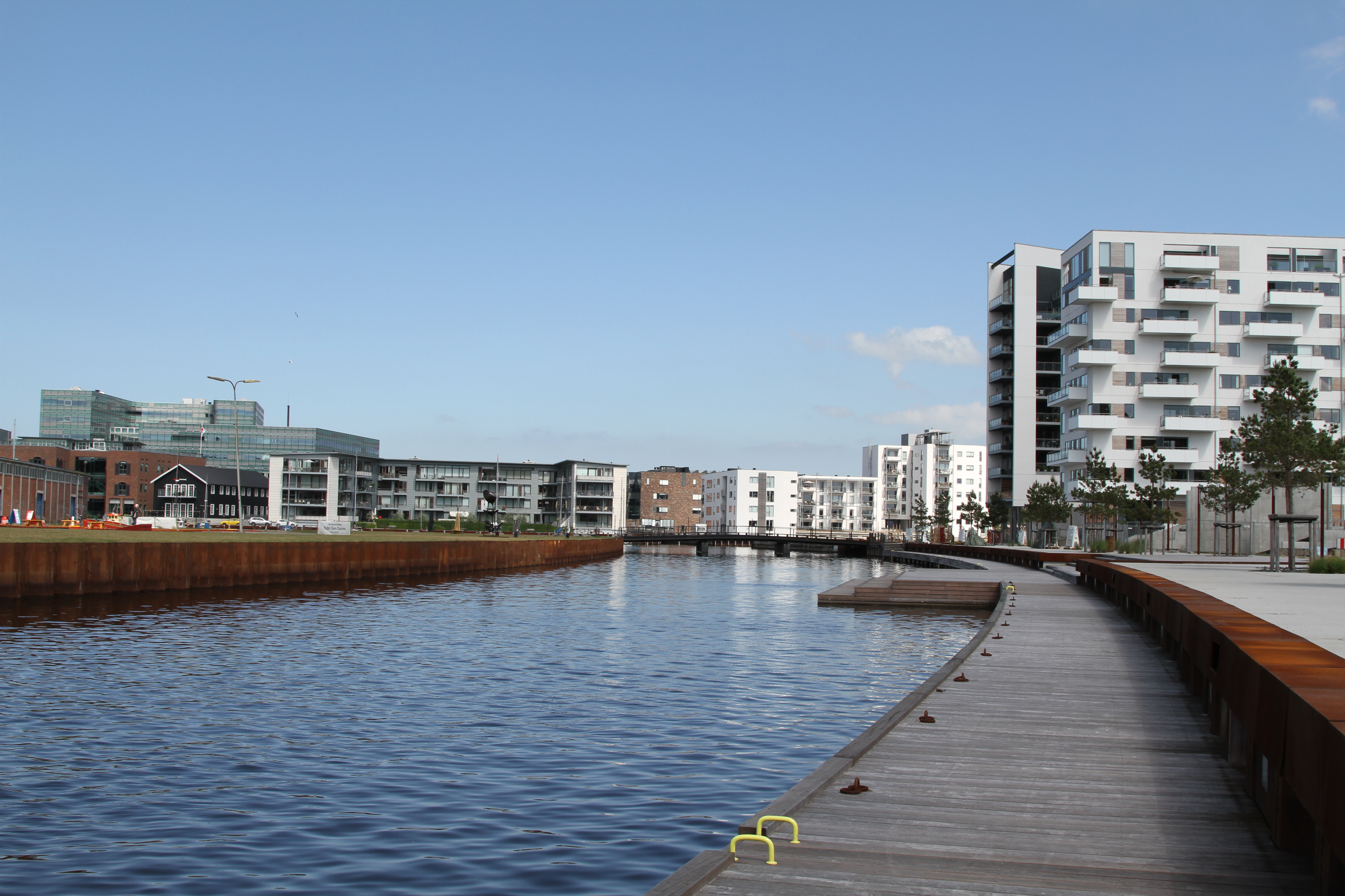 Beboelsesejendomme i Odense Indre Havn / Blocks of flats in Odense Inner Harbour, Funen, Denmark